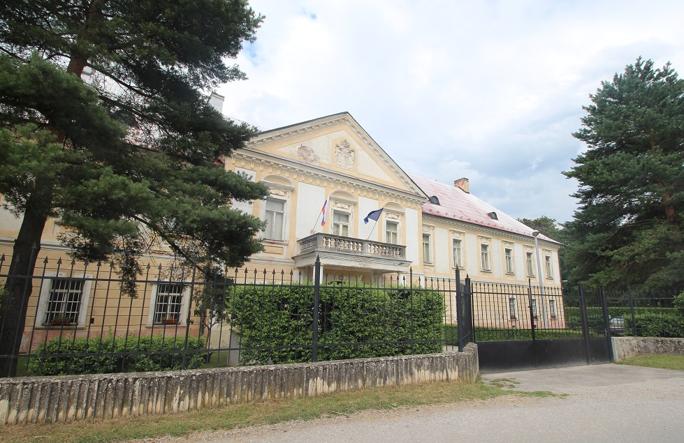 klasicistní zámek z 19.stol.